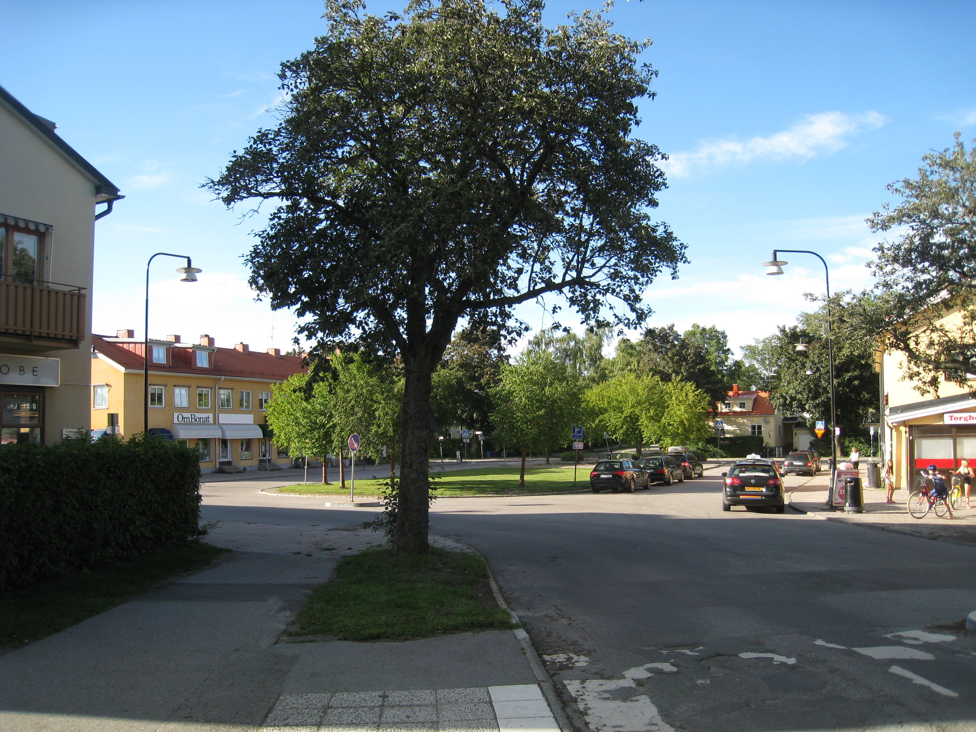 Ängby torg, Norra Ängby, Bromma. Vy från Vultejusvägen från syd mot norr.